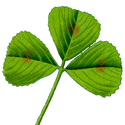 Medicago arabica (Fabaceae) leaf